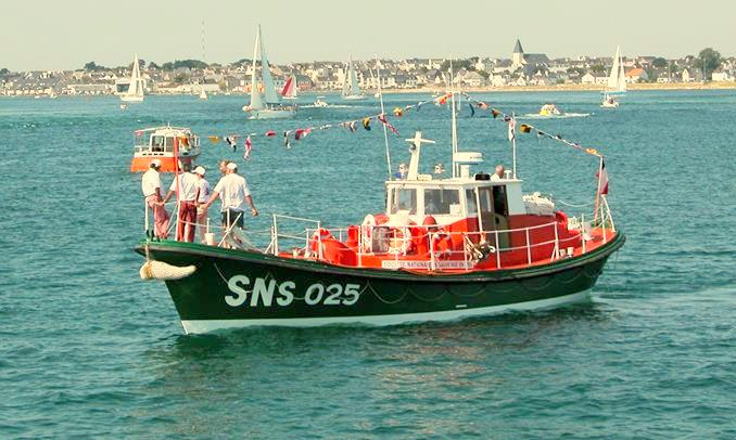 Canot de sauvetage Patron Emile Daniel : SNSM Etel